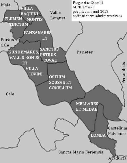 Concilii Gundemaris freguesiae post novam anni 2013 ordinationem administrativam